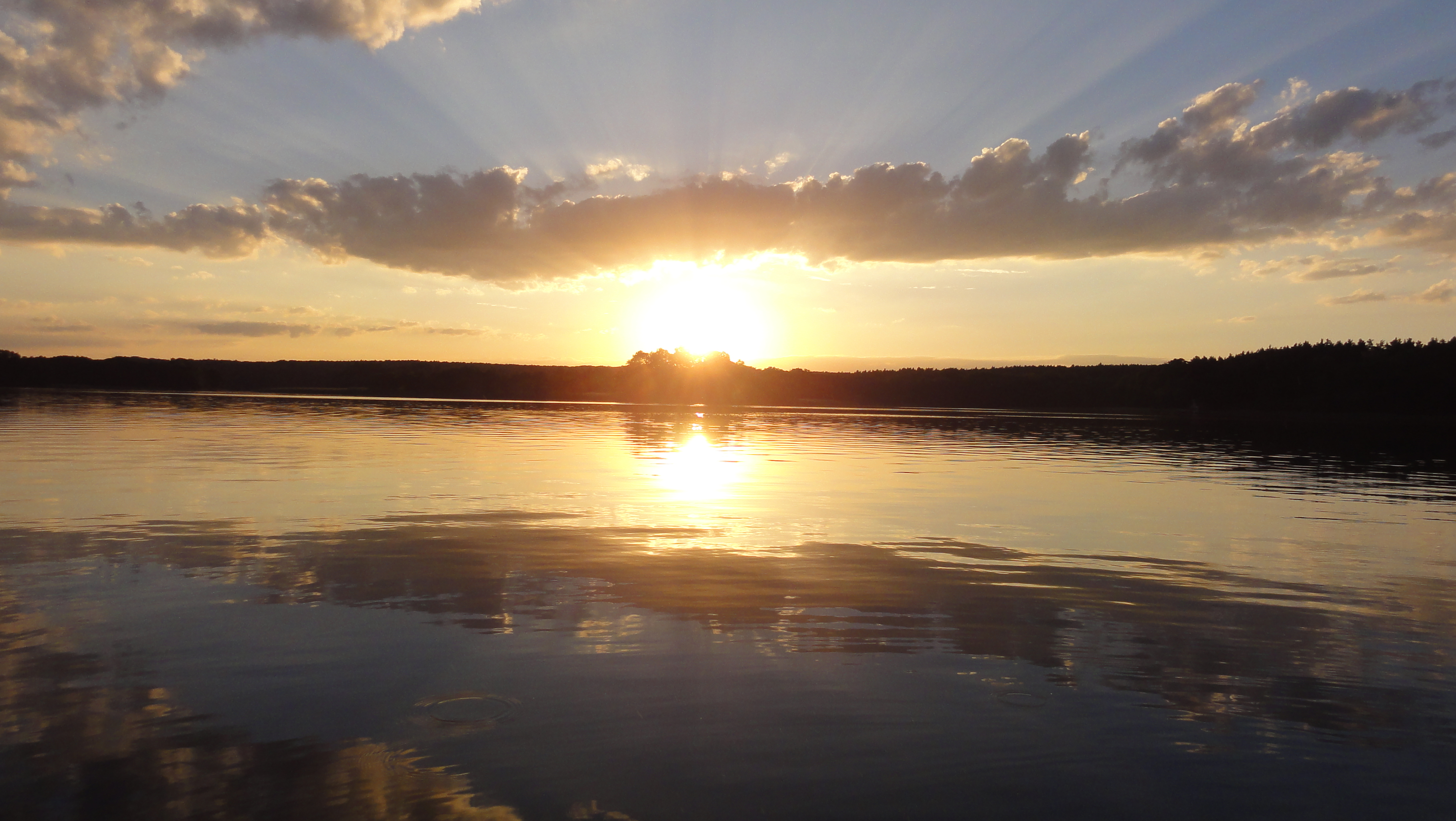 Lutzin